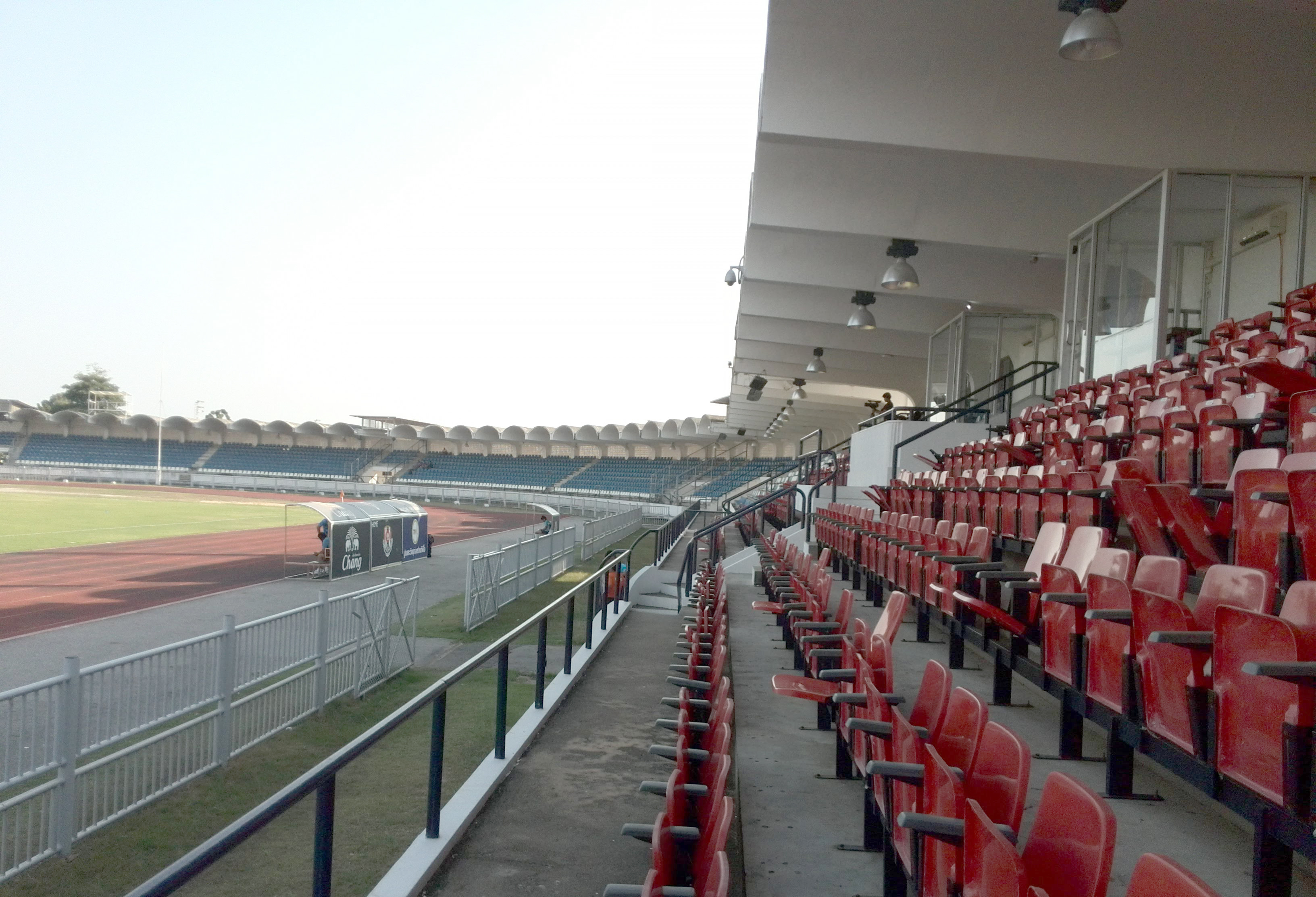 Navy Stadion